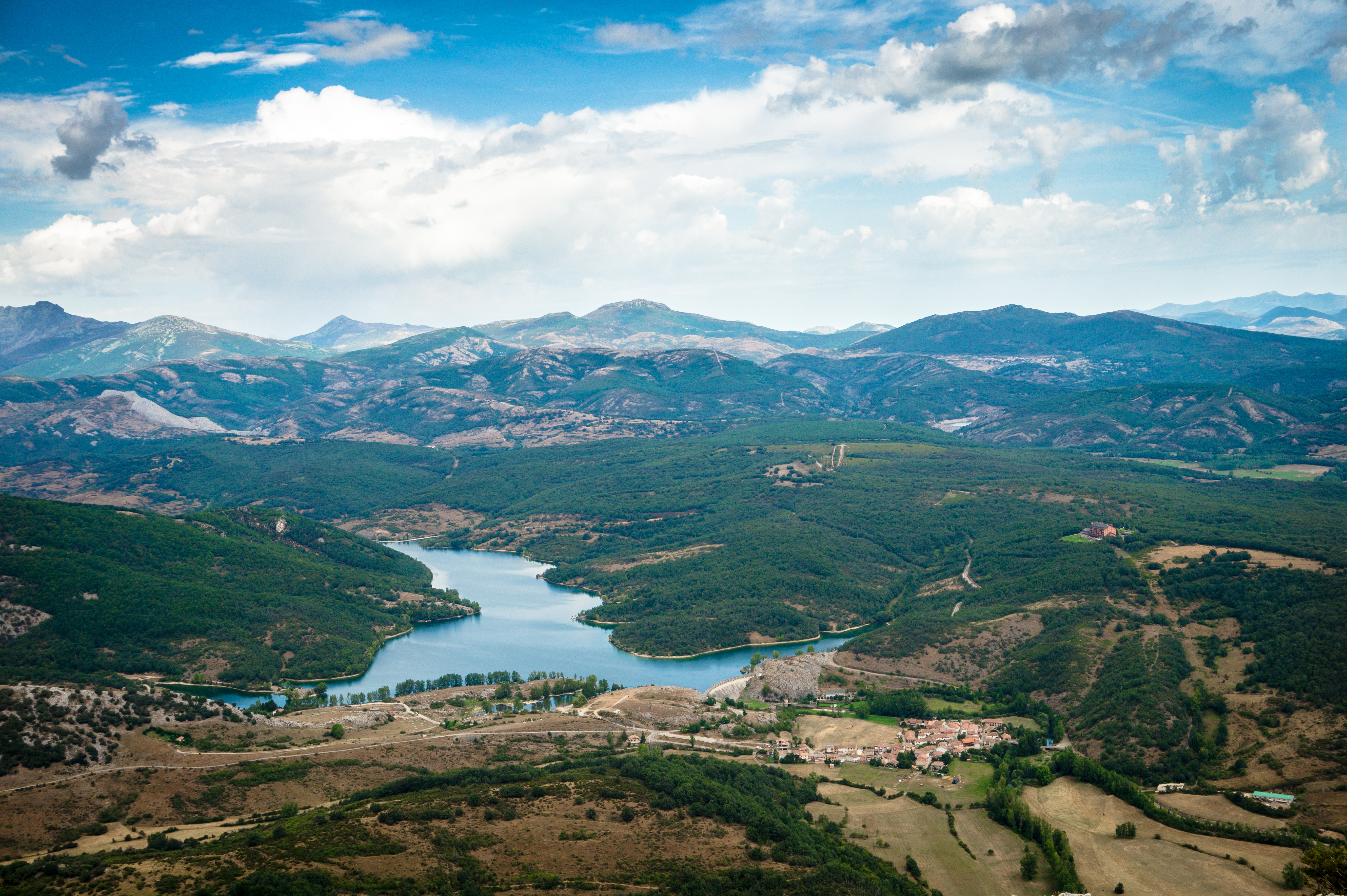 Embalse de Cervera-Ruesga, parque de Fuentes Carrionas y Fuente Cobre-Montaña Palentina, vsto desde Pico Almonga (1520 m). This is a photography of a Special Area of Conservation in Spain with the ID: ES4140011. Natura2000 entry, EEA entry